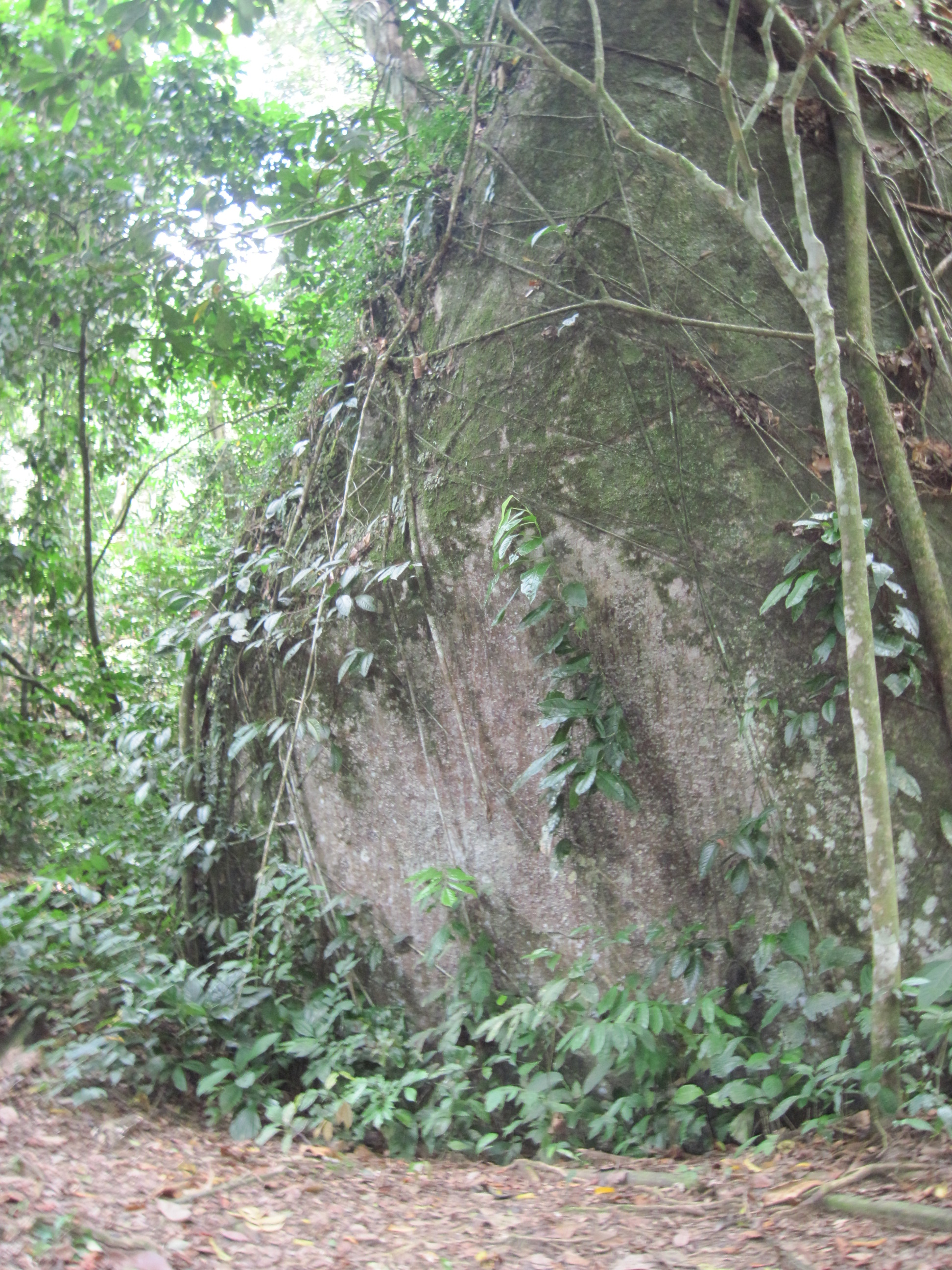 Batu besar Batu Maloi.